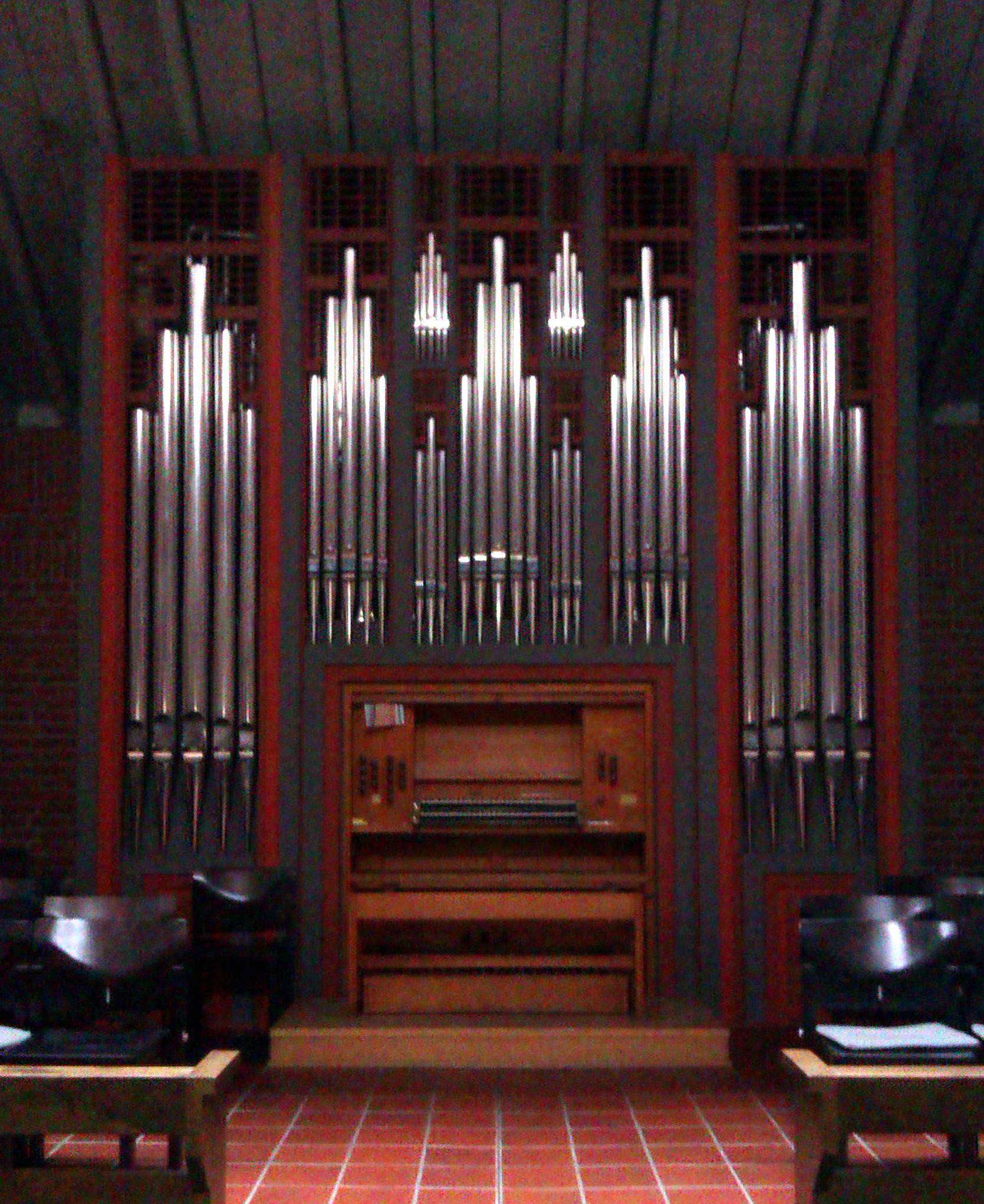 Die Rieger-Orgel in der Michaelskirche auf dem Schwanberg / Steigerwald